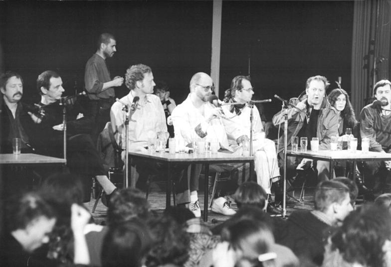 ADN-ZB-Senft-3.12.89- Berlin: "Verlorene Lieder - verlorene Zeit" war am 2.12.89 im "Haus der Jungen Talente" das Motto eines Konzertes von Liedermachern aus der DDR und ehemaligen aus der DDR ausgewiesenen Künstlern. Daran schloß sich eine lebhafte Diskussion an, zu der im Präsidium Platz genommen hatten v.l.: Wolf Biermann, Dr. Dietmar Keller, Pfarrer Friedrich Schorlemmer, Lutz Bertram, Matthias Görnandt, ein Arbeiter aus Gera, Bettina Wegner und Jürgen Fuchs.